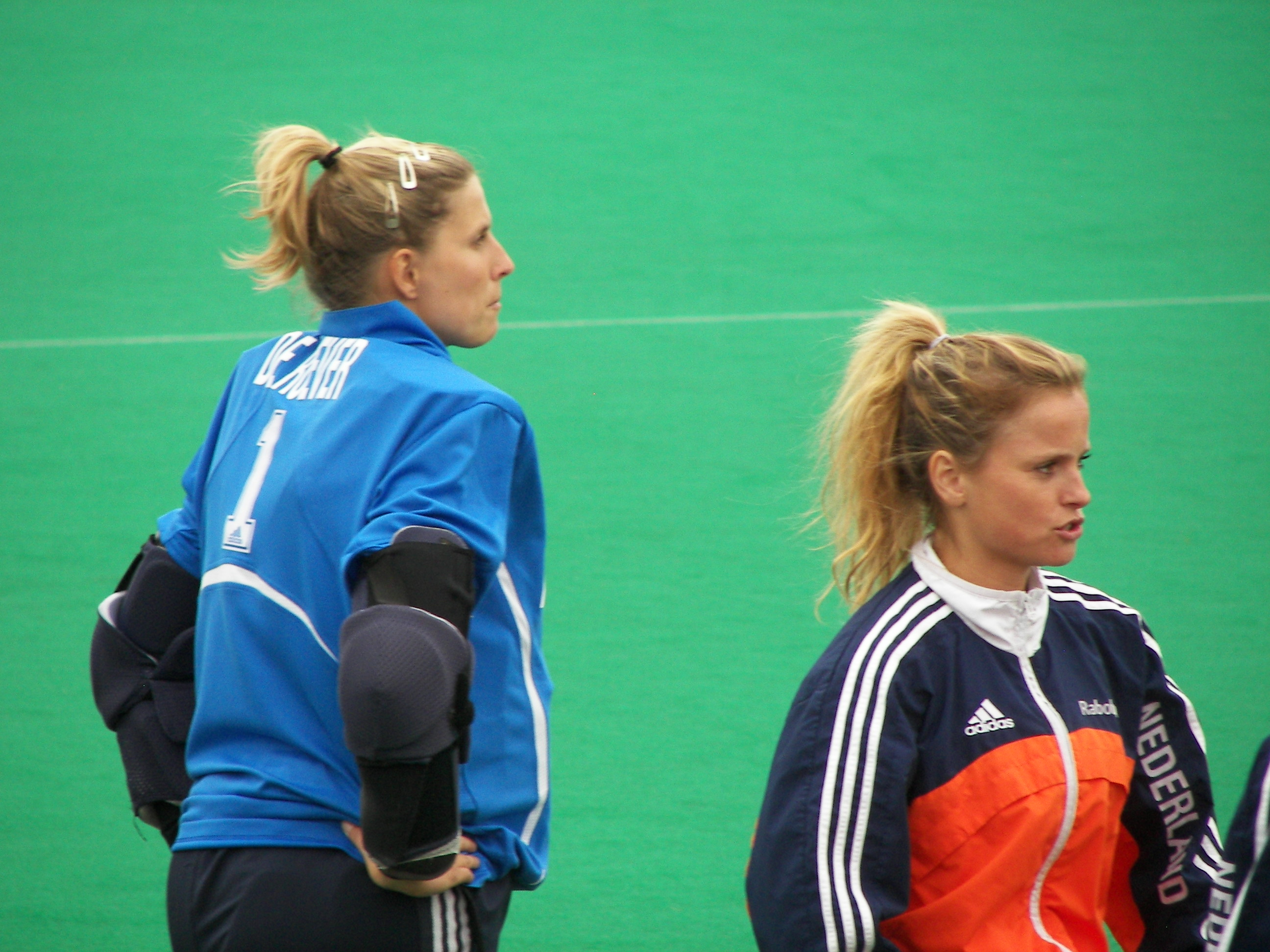 Fatima Moreira de Melo im August 2007